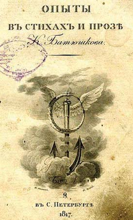 Книга «Опыты в стихах и прозе» К. Н. Батюшкова